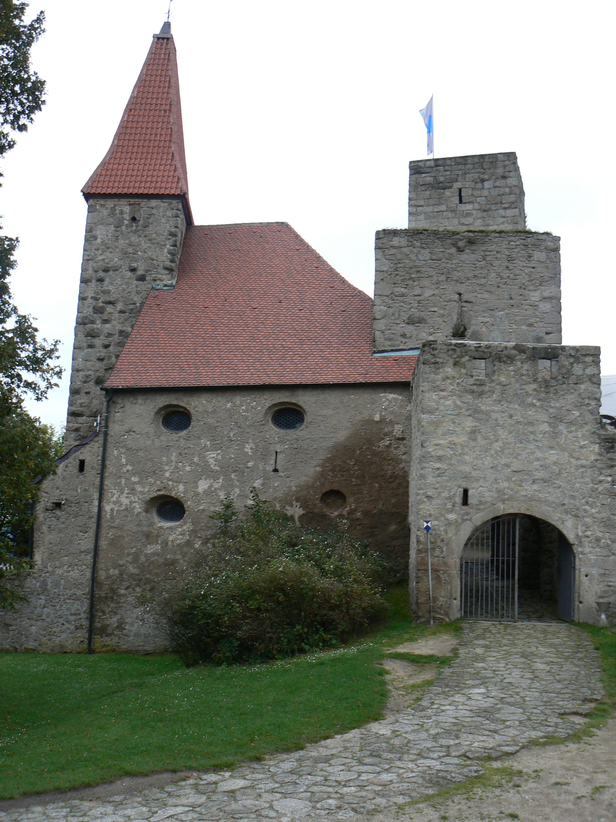 Hrad Leuchtenberg